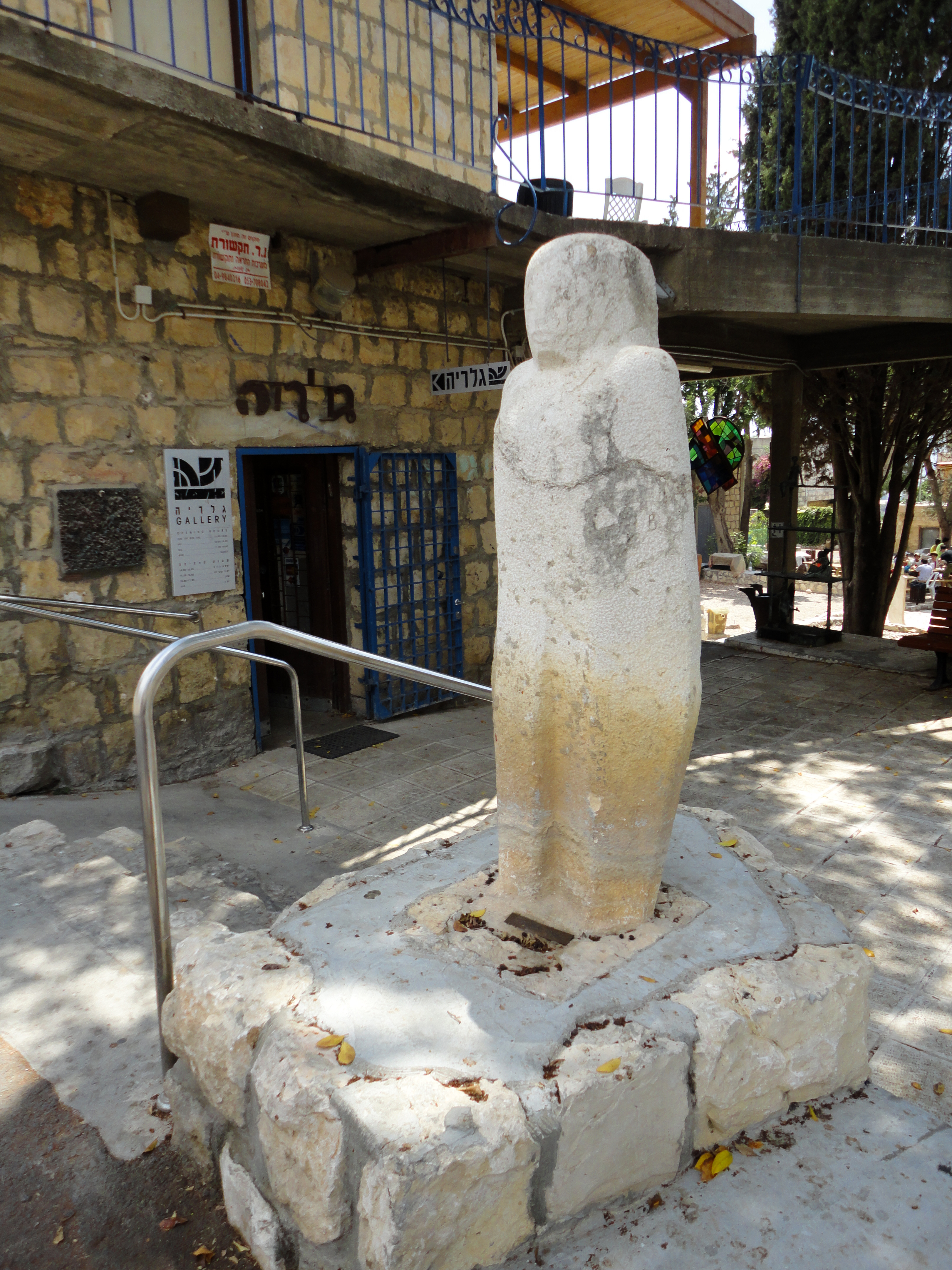 Sculpture